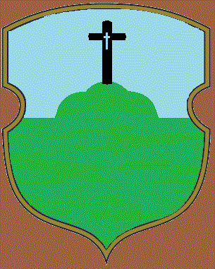 Войтовский герб